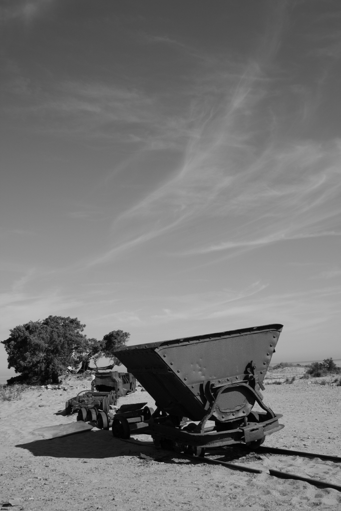 Carrellini della Miniera di Ingurtosu abbandonati sulla spiaggia di Piscina ad Arbus, Sardegna.